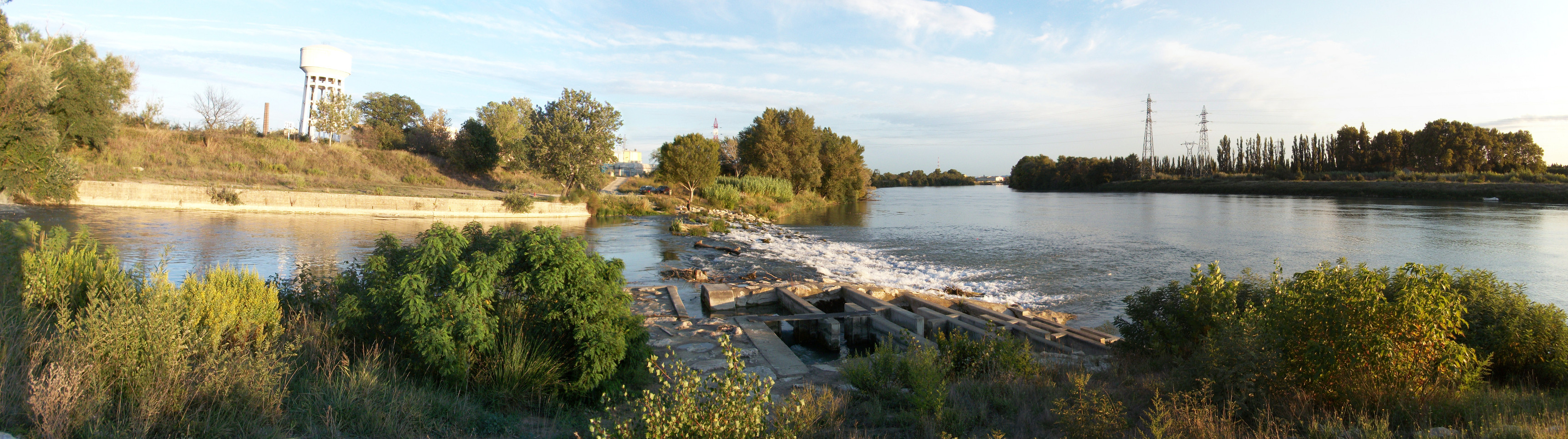 Confluence de l'Ouvèze et du Rhône, vue du Nord (rive droite de l'Ouvèze). En arrière plan, la papeterie Alfa au Pontet. L'image est un assemblage panoramique de trois photos (réalisé avec Hugin).